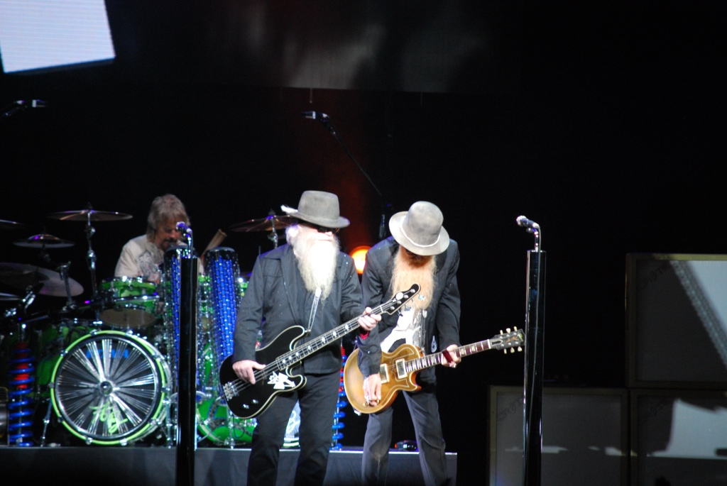 ZZ Top - Via Funchal - S.Paulo